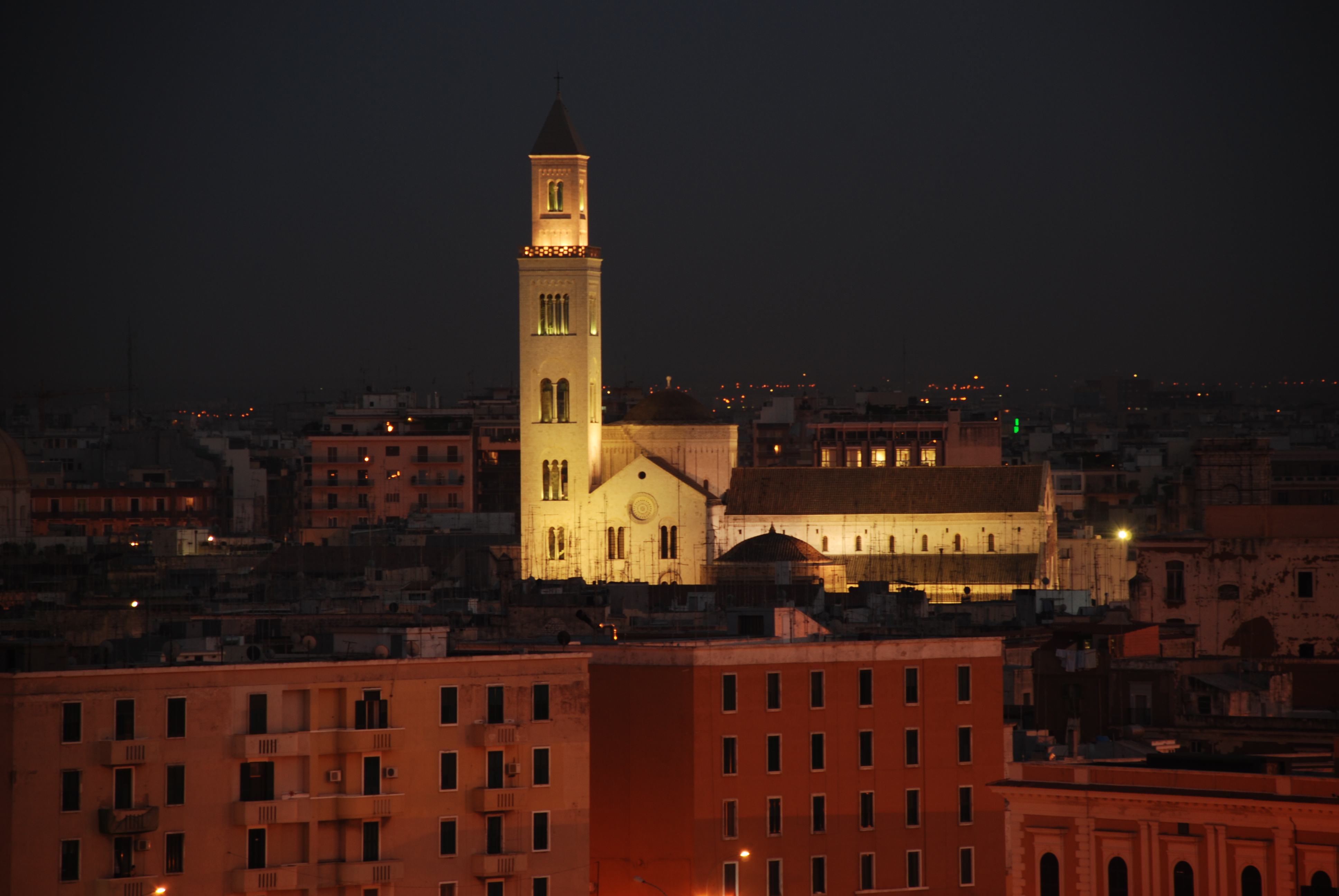 Srpskohrvatski / српскохрватски: Crkva sv. Nikole viđena iz luke.